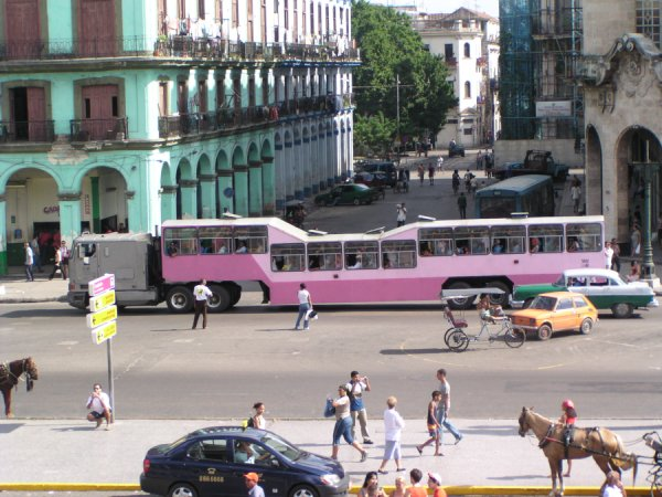 Stadtbus in Havanna/ Kuba, sog. Camello (dt. Kamel)